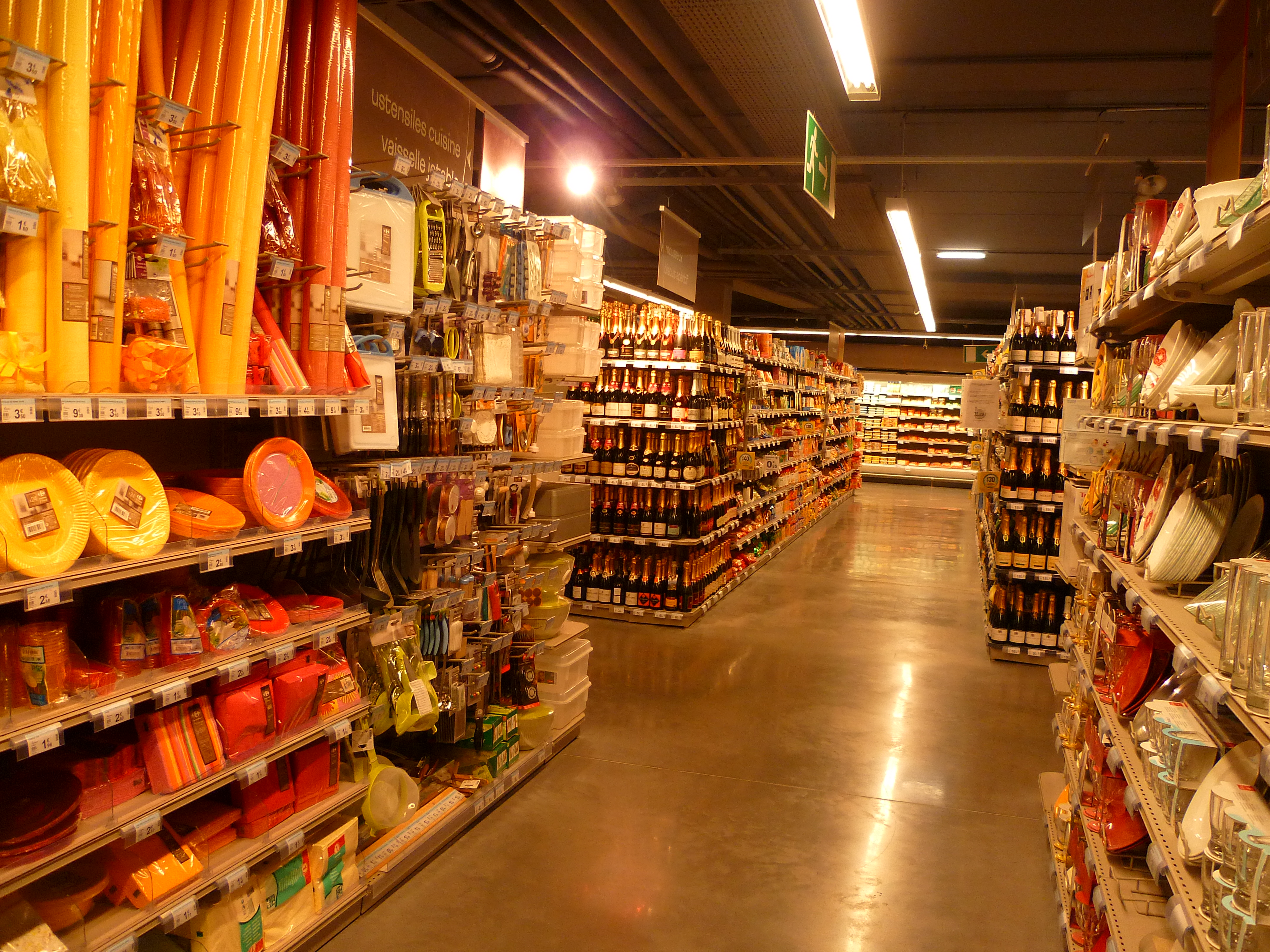 Carrefour market des Ramassiers à Colomiers (Haute-Garonne, France).